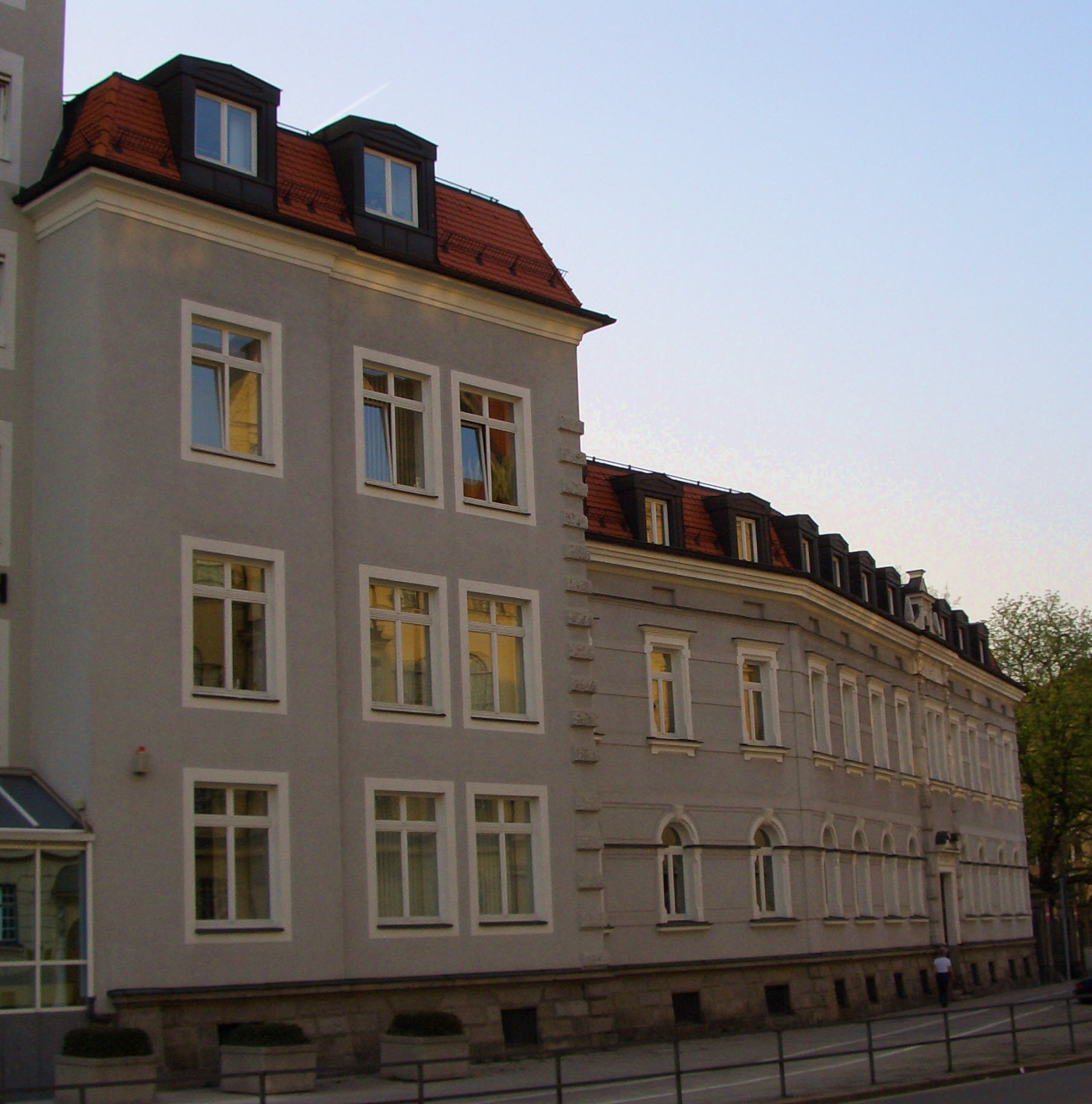 Nordflügel des Casinos der Oberwiesenfeldkaserne München